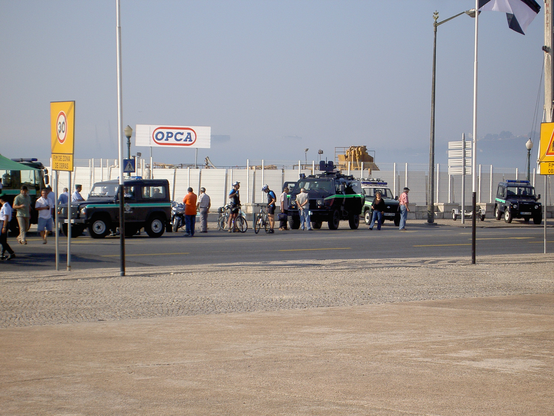 GNR cars opposite of Praça do Comércio in Lisbon